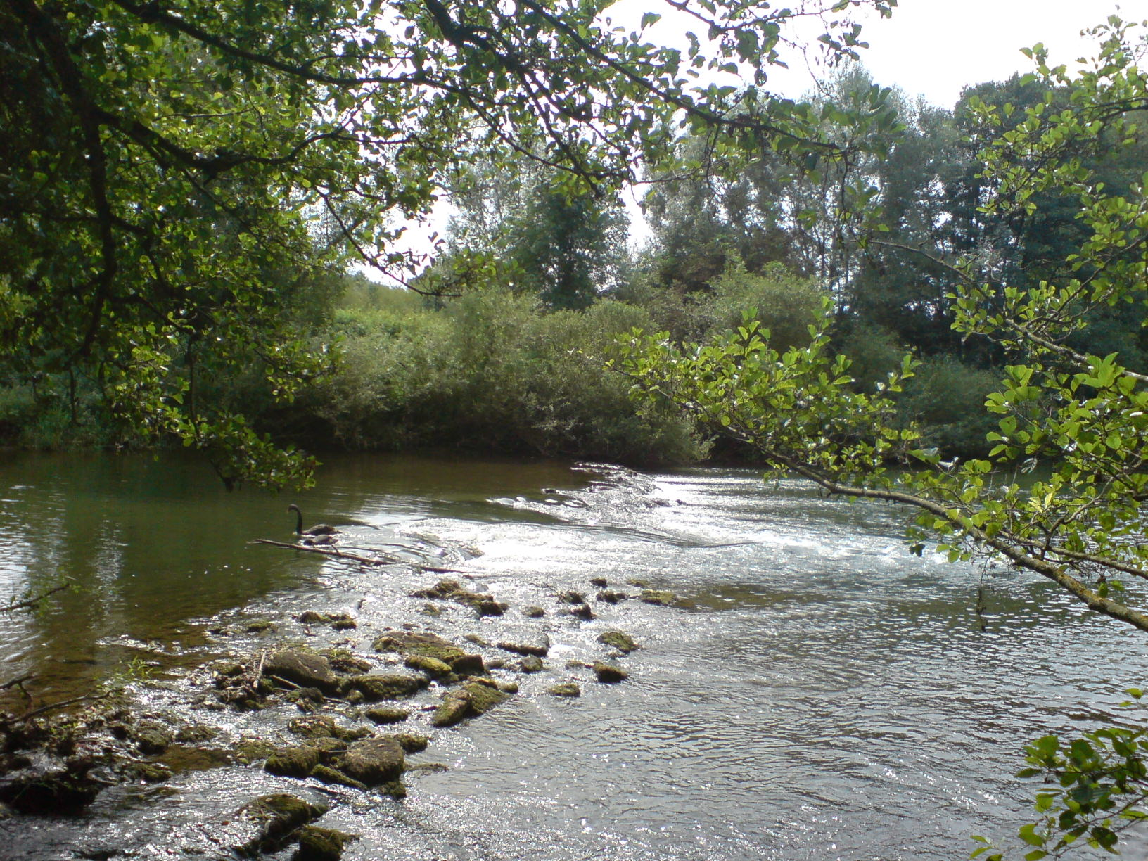 Stromschnelle der Jagst bei Untergriesheim bei niedriger Wasserführung im August, zwei Trauerschwäne